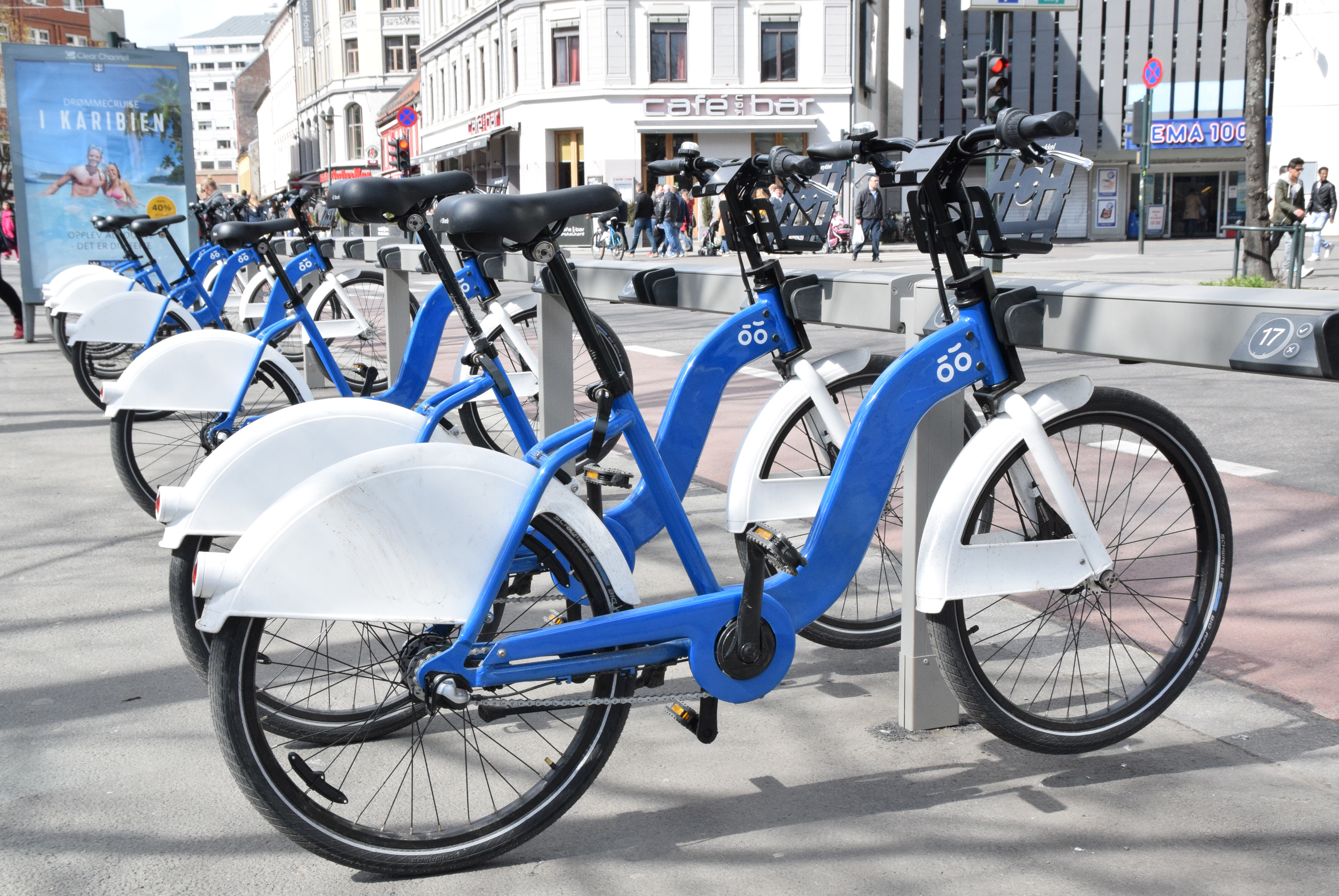 Oslo bysykkel, april 2016, Brugata ved Vaterlandsparken